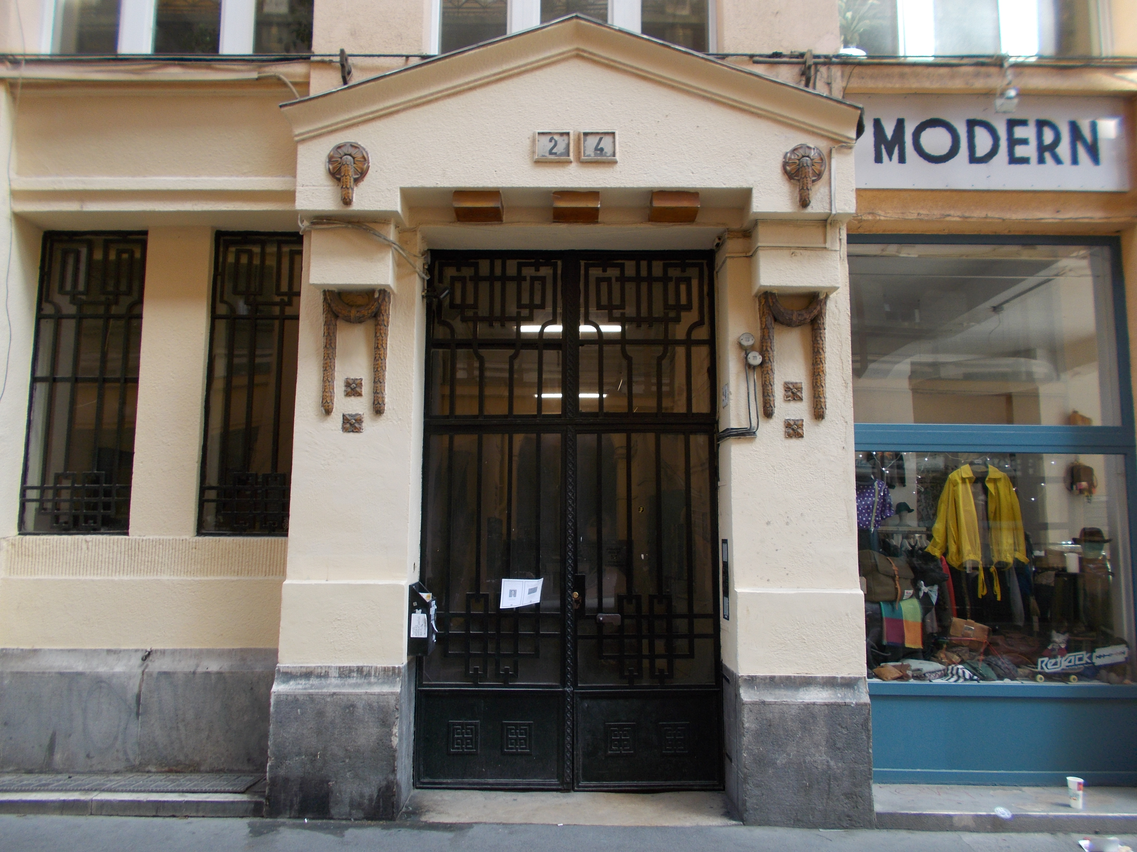 Anker-ház. Kapu. Műemlék ID 12151 - Magyarország, Budapest, Terézváros, Anker köz 2-4